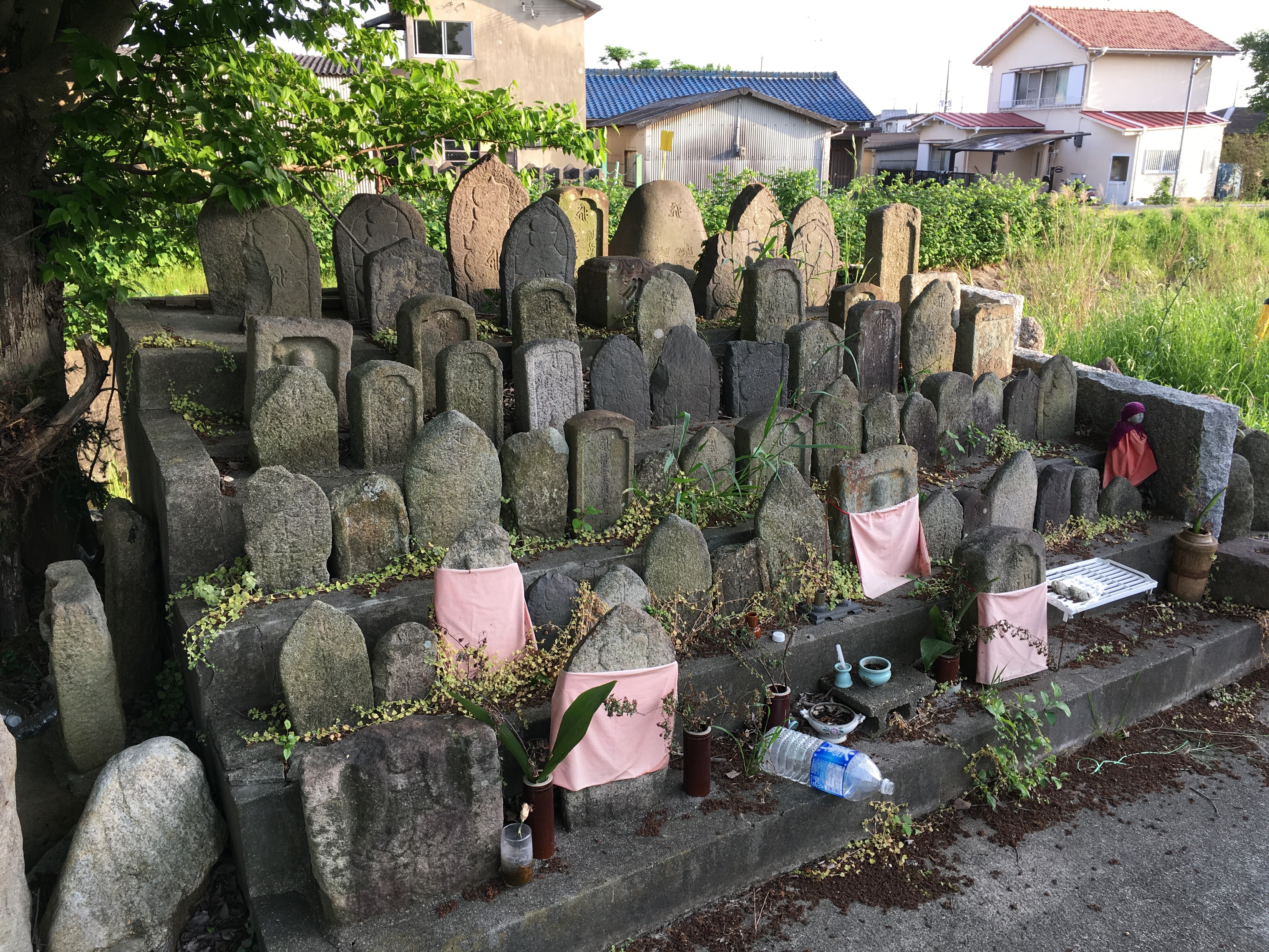 奈良市、福寺池の底から出た石仏群